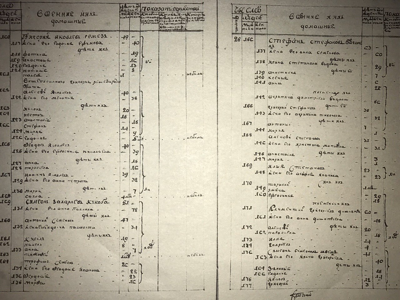 Совідний розпис містечка Горошина в якому записаний 81-річний син засновника хутора Семен Захарович Кукоба